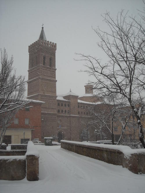 Torre el 9 de Enero de 2009